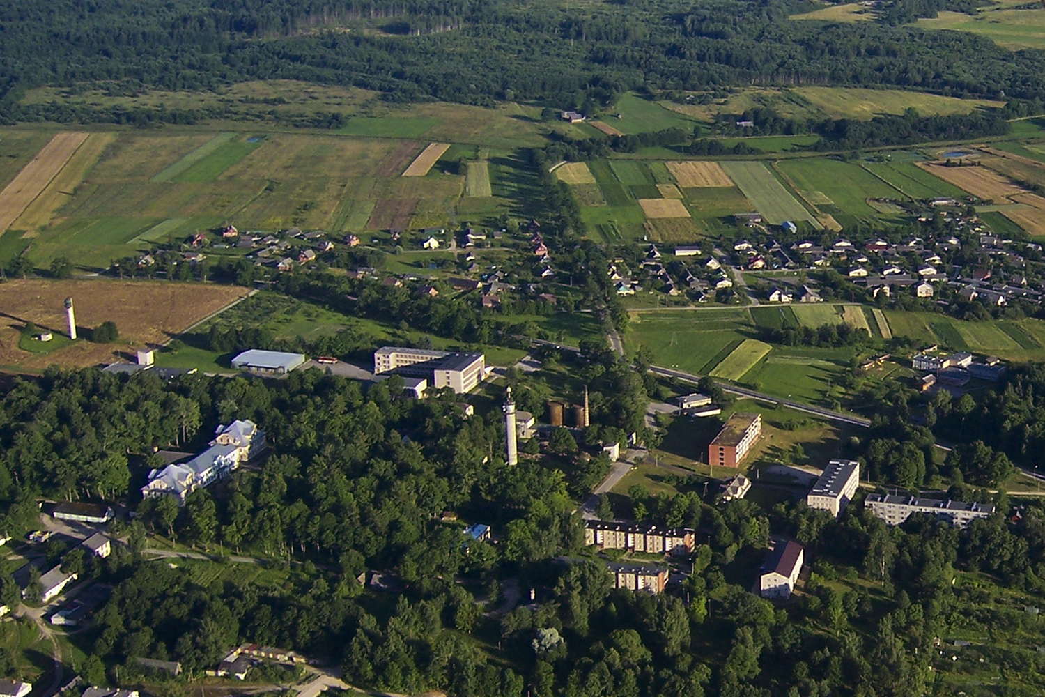 Malnavas koledža un Malnavas ciemats no putna lidojuma 2009.gads.